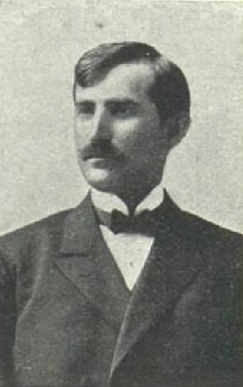 František Sojka (1875- ), rakouský a český statkář a politik